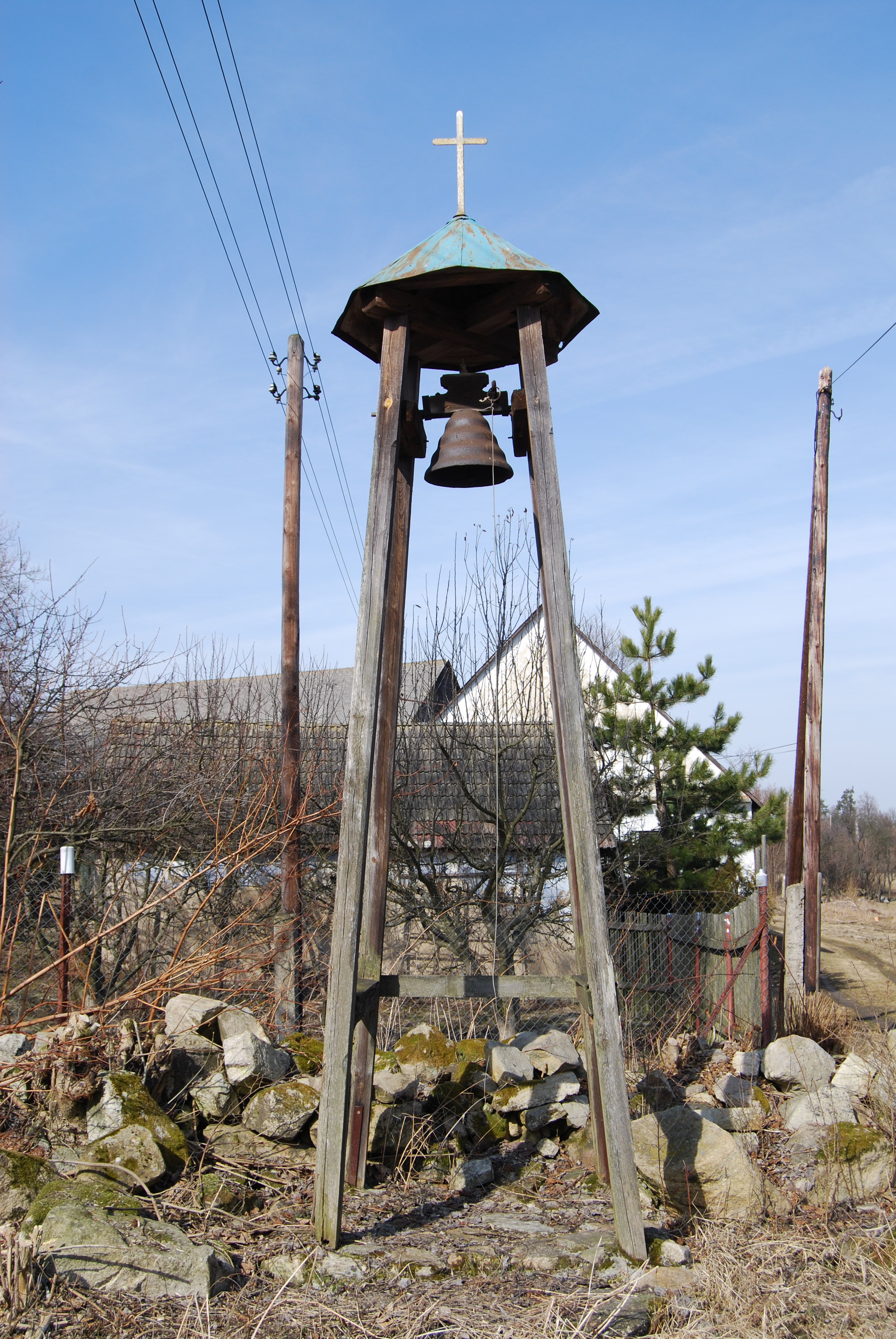 Zvonice v obci. Klokočov je osada, část obce Vlksice v okrese Písek. Česká republika.